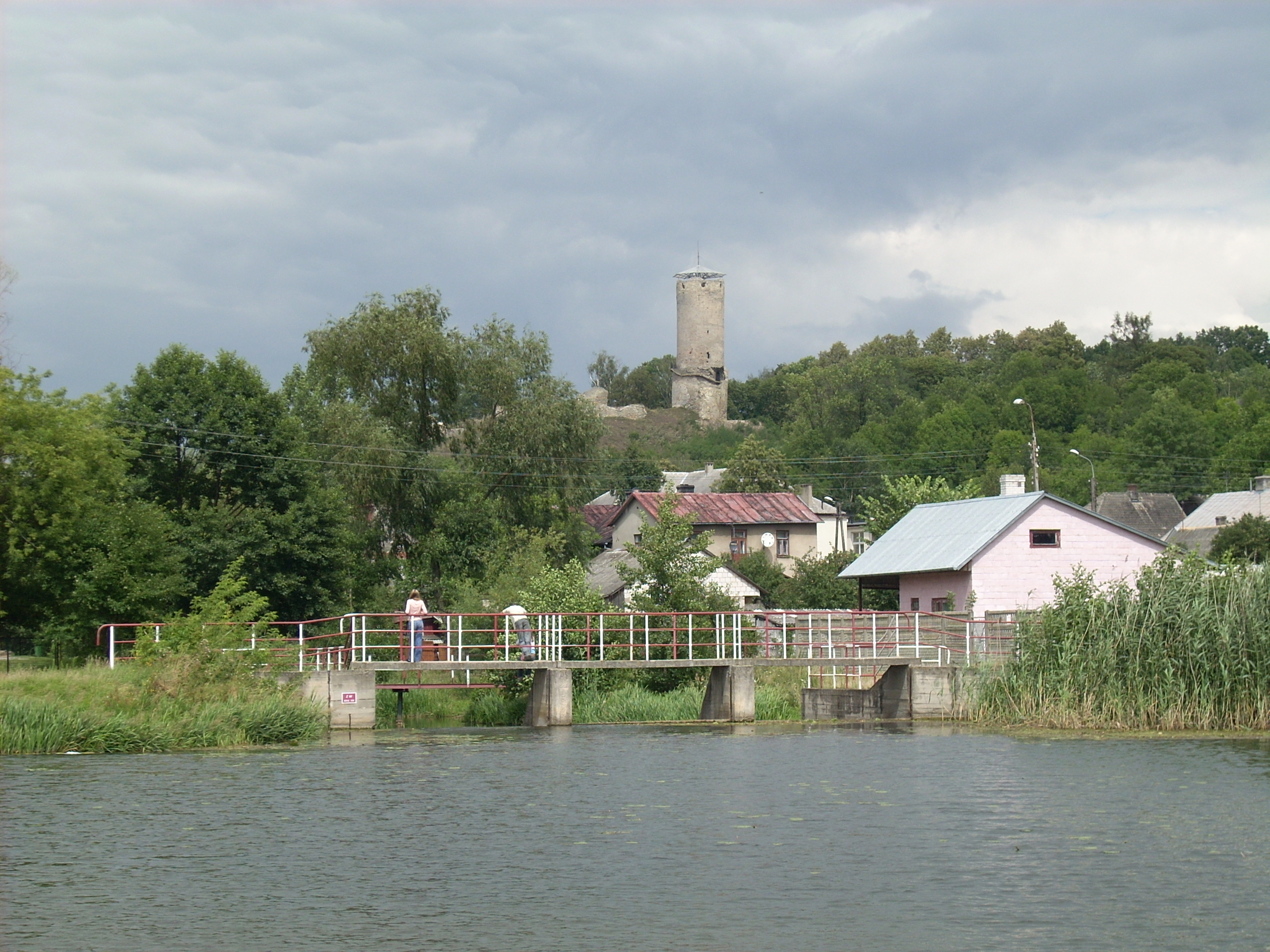 Iłża - Widok na średniowieczną basztę od strony zalewu.